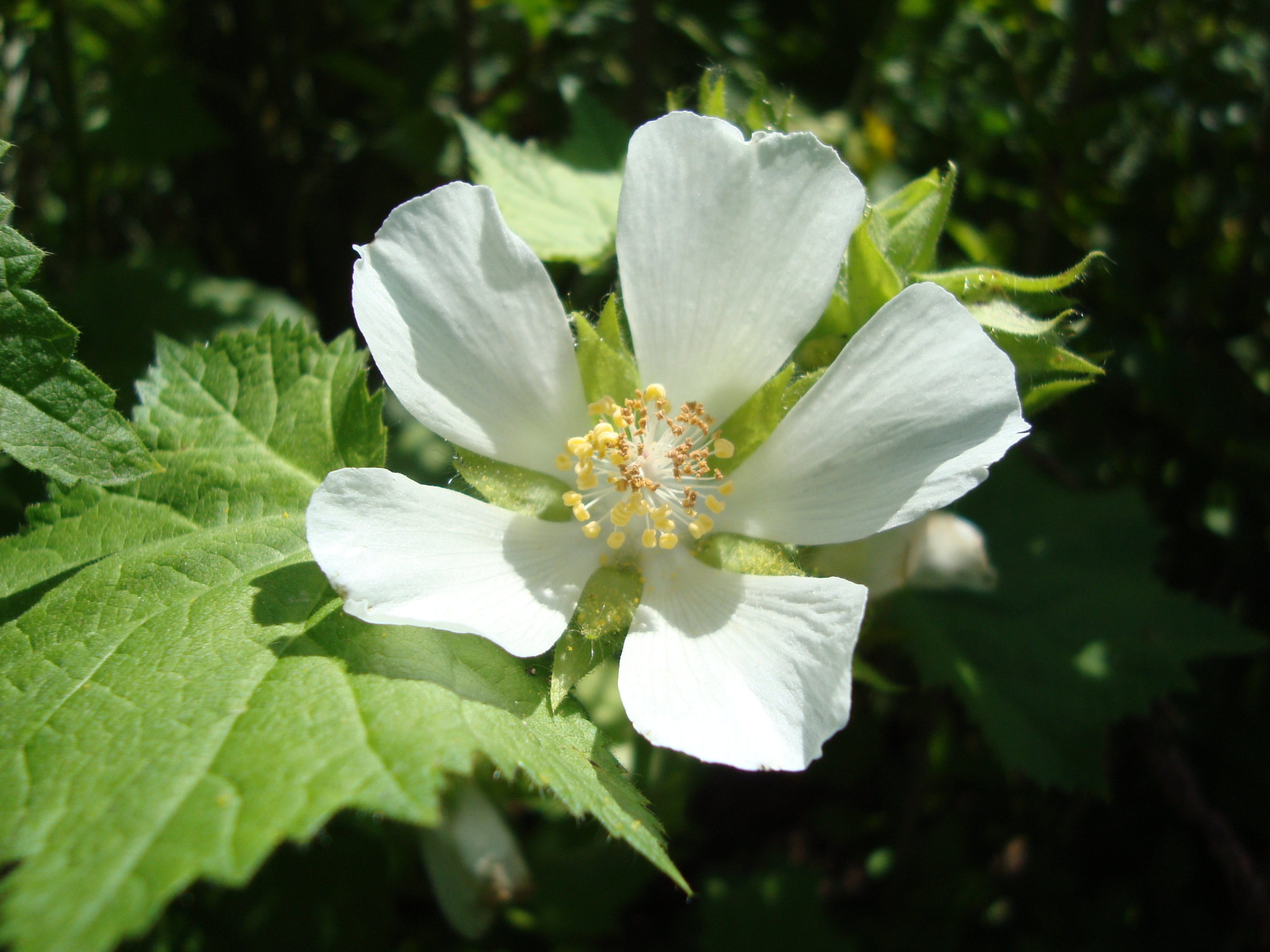 Kitaibela vtifolia